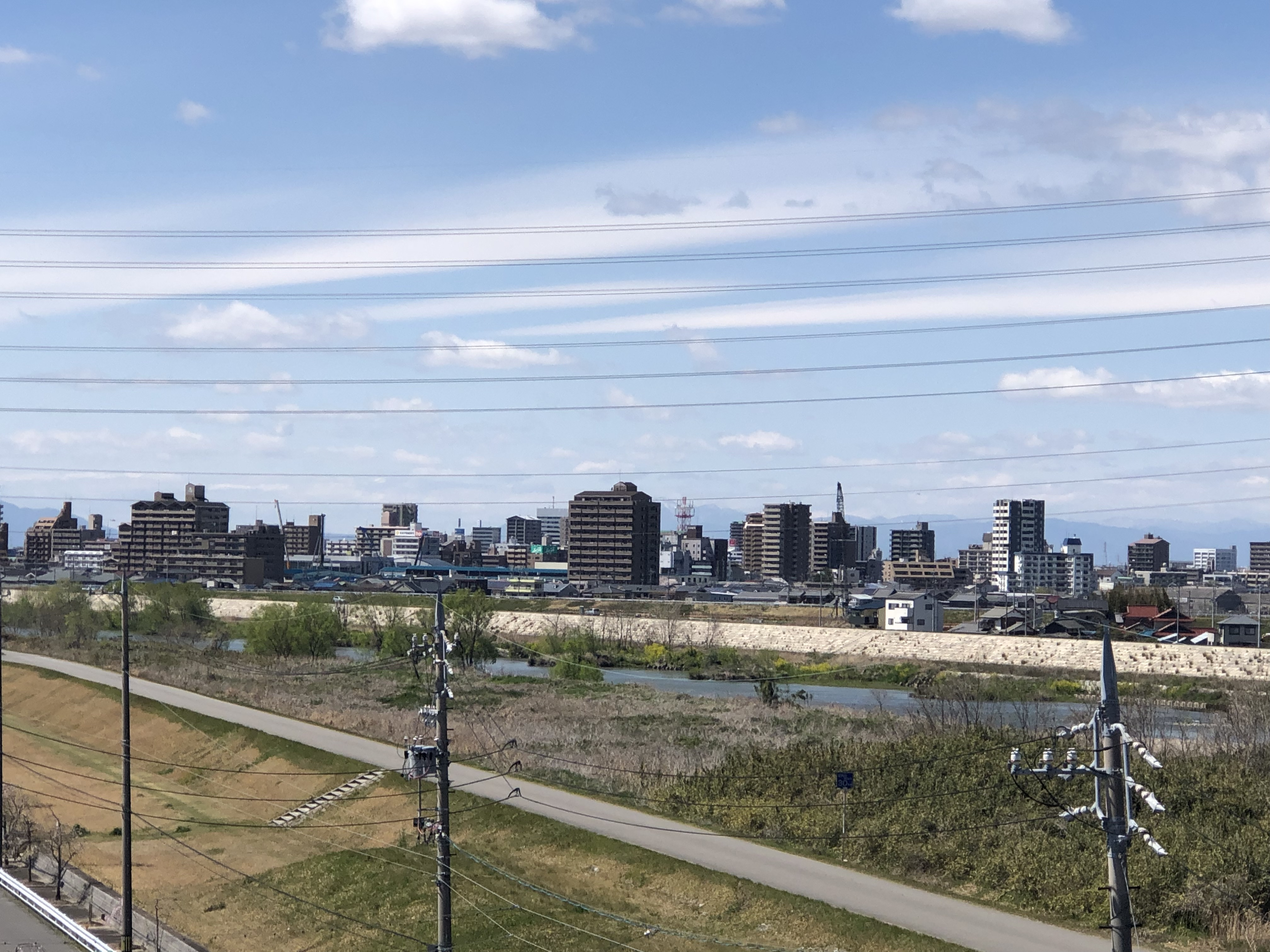 ホームセンター「DCMカーマ・守山吉根店」の屋上から遠望した庄内川と春日井市の市街地。西北西の方向を見る。